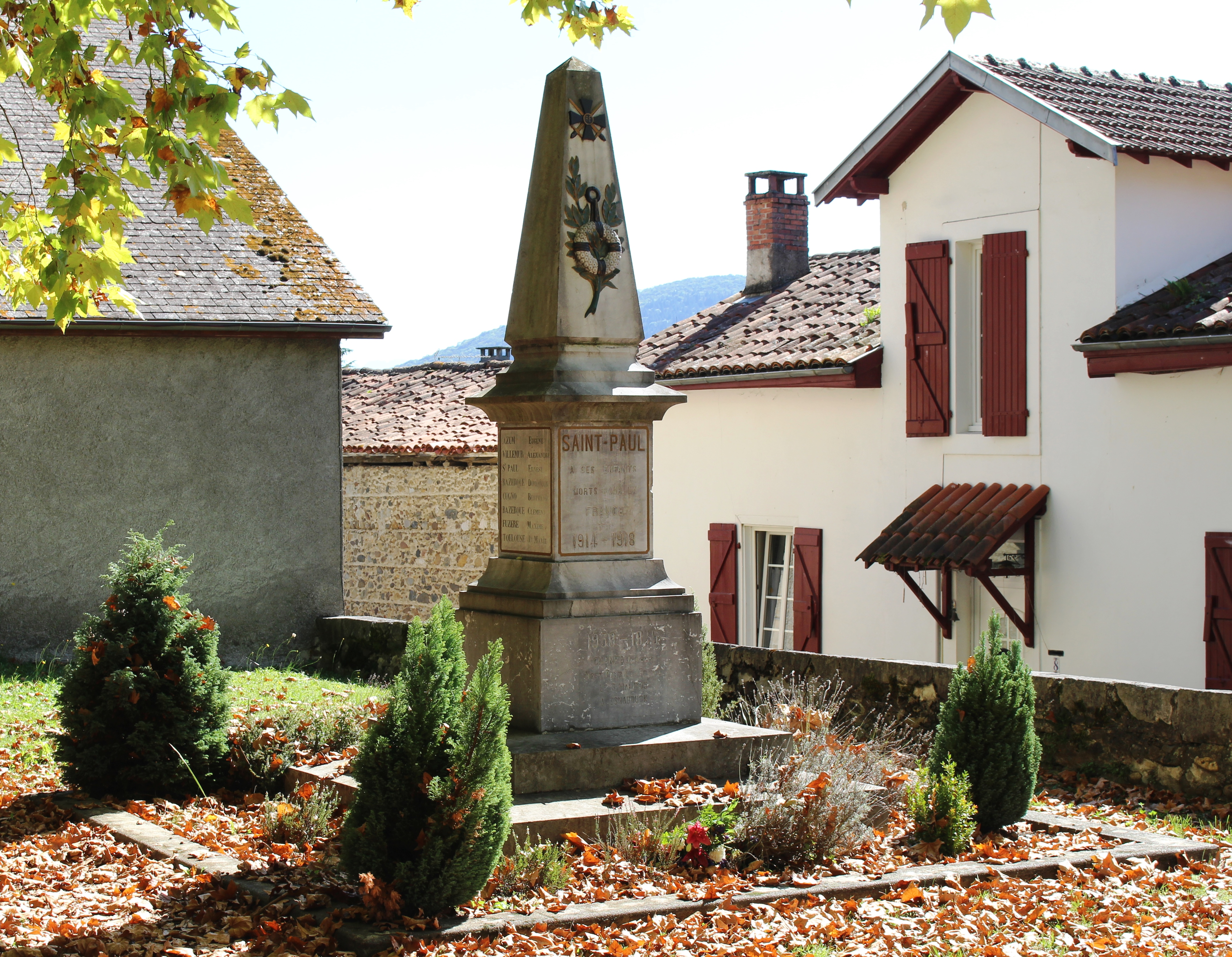 Monument aux morts de Saint-Paul (Hautes-Pyrénées)